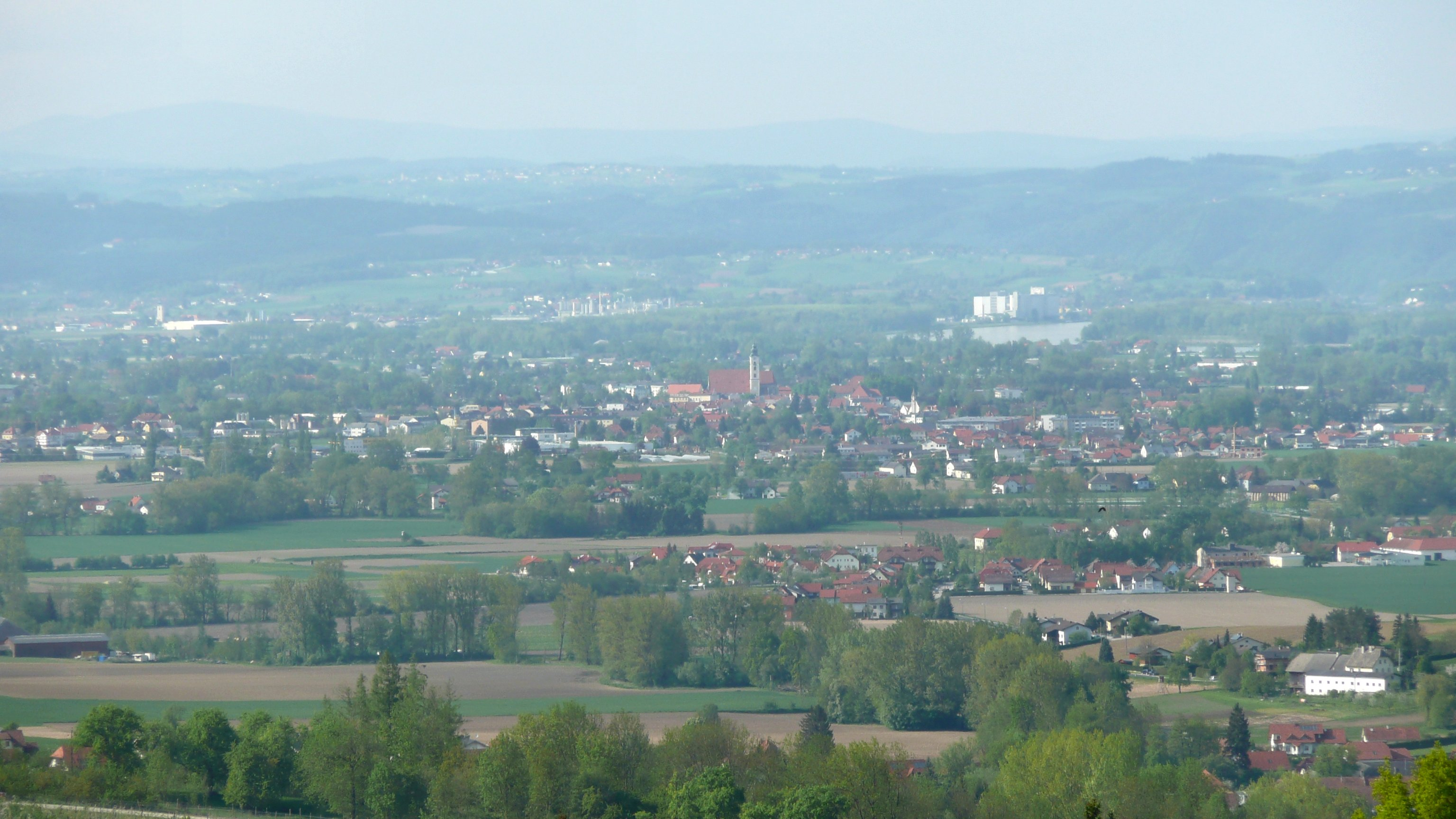 Blick von Scharten auf Eferding